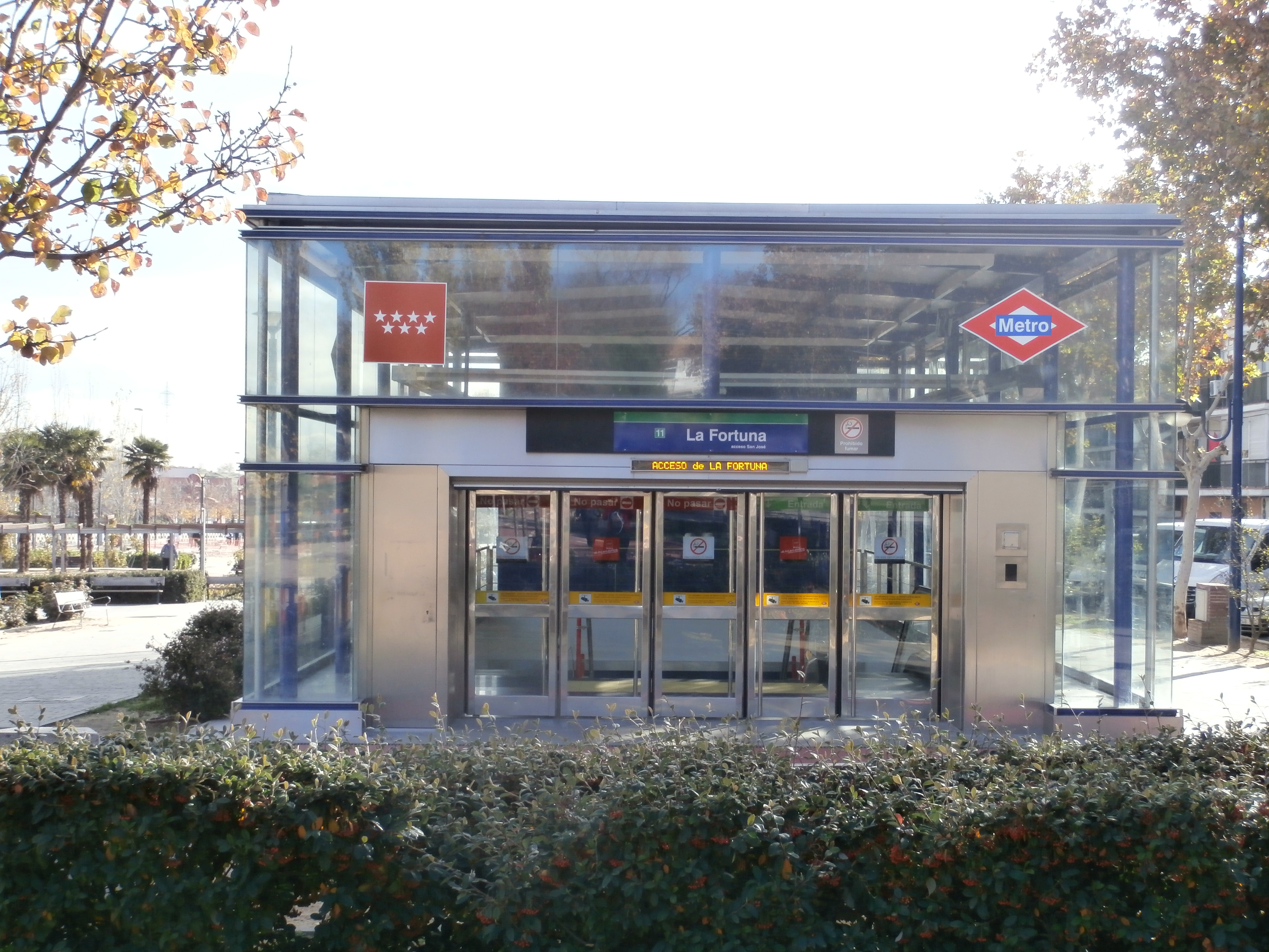 Boca de acceso de la estación de La Fortuna en Leganés.